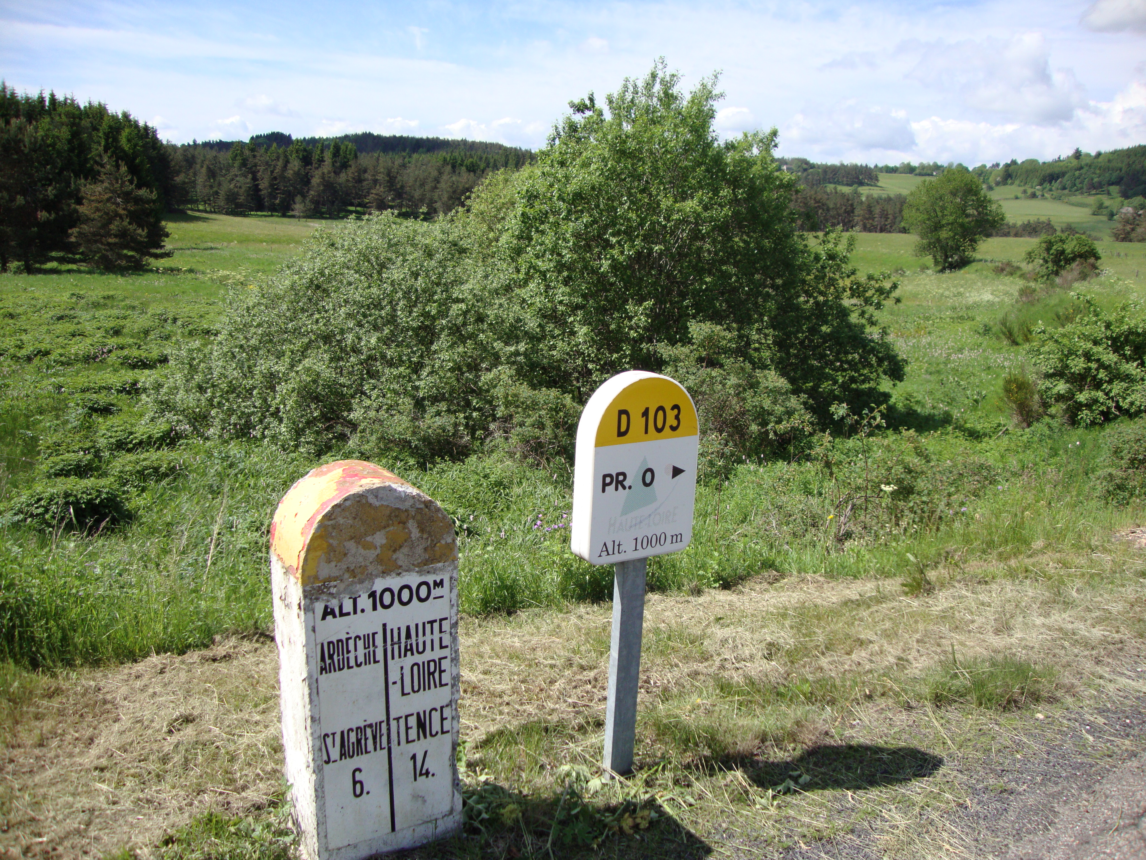 Borne limite départements entre St.Agrève, Ardèche (D 120) et Le Chambon-sur-Lignon, Haute-Loire (D103)